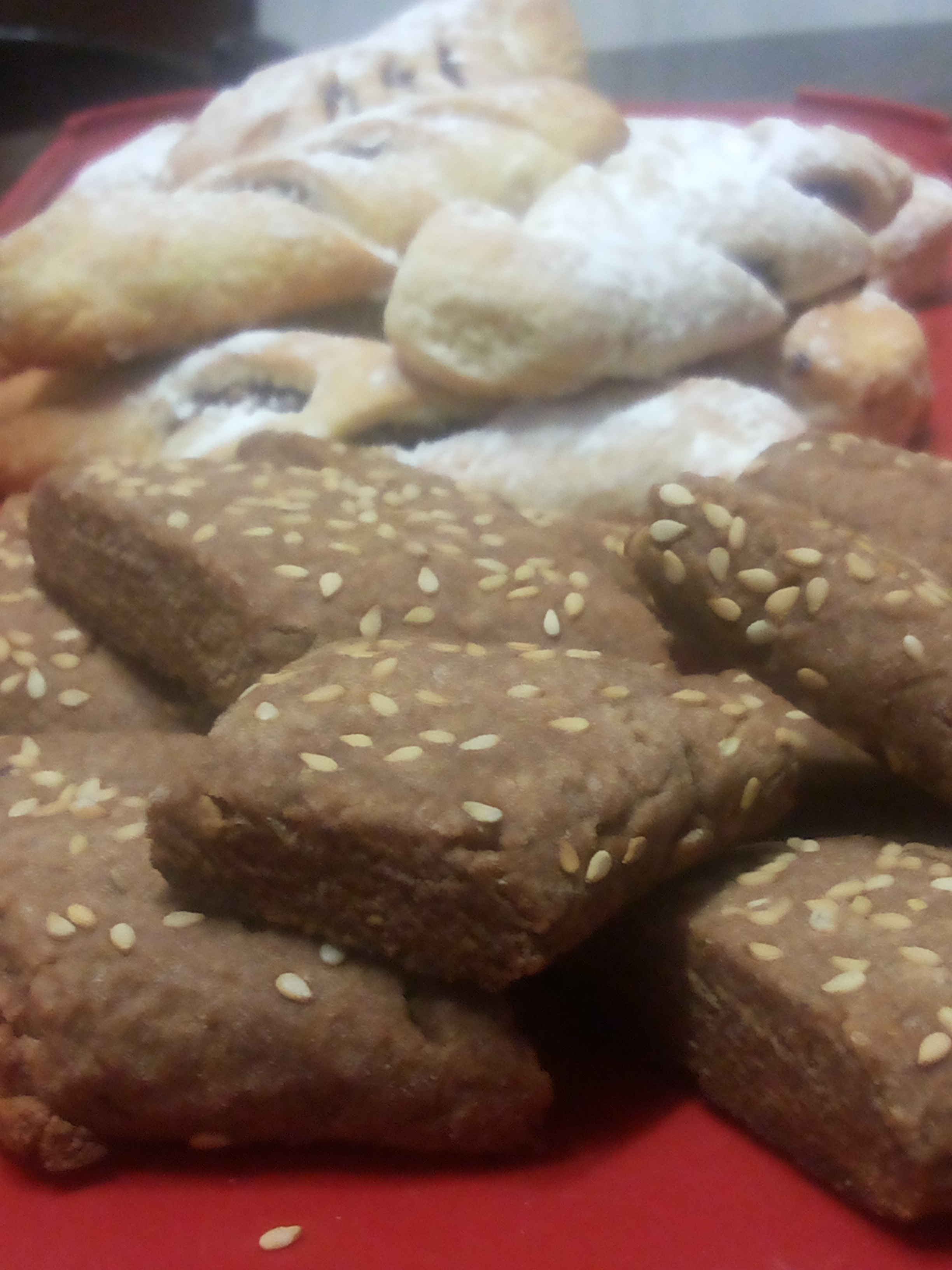 Dolci tipici siciliani: "mustazzola" (in primo piano) e "cuddureddi" (in secondo piano)